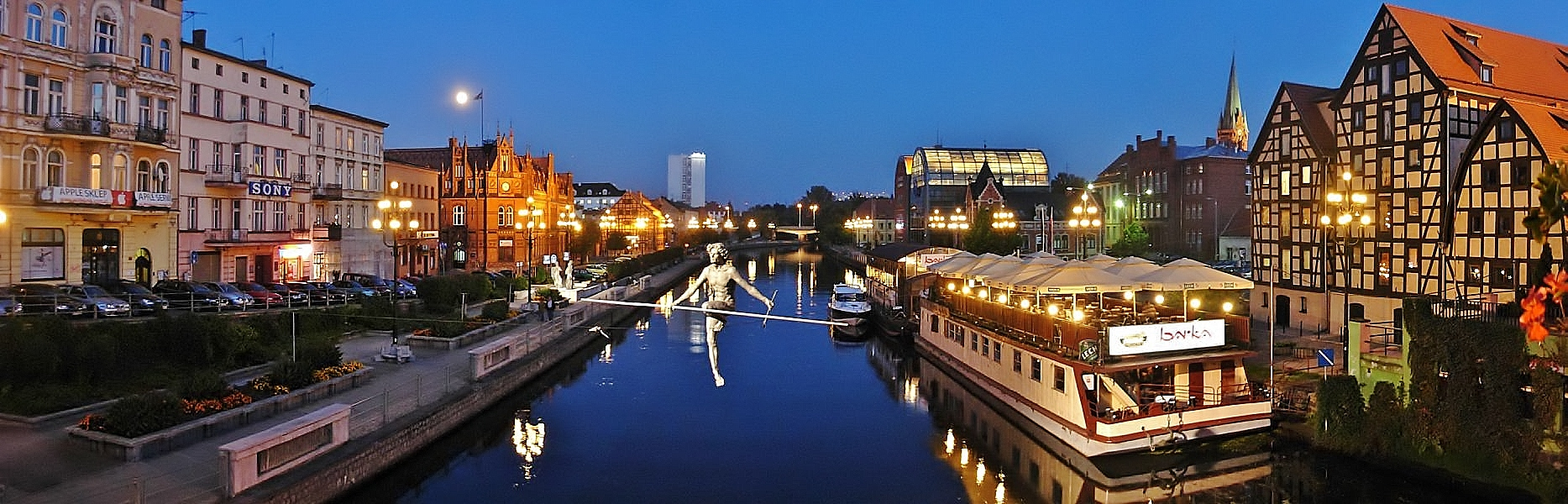 Widok z mostu im. Jerzego Sulimy-Kamińskiego w kierunku wschodnim